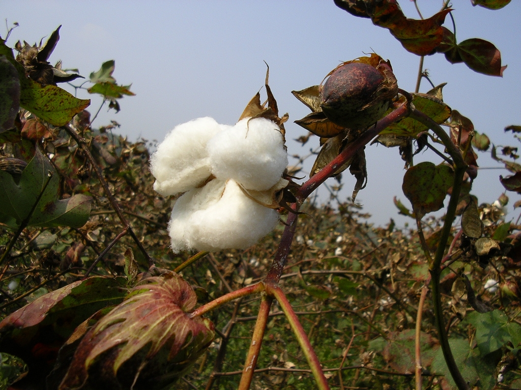 Baumwollkapsel, cotton boll, Guangxi, China